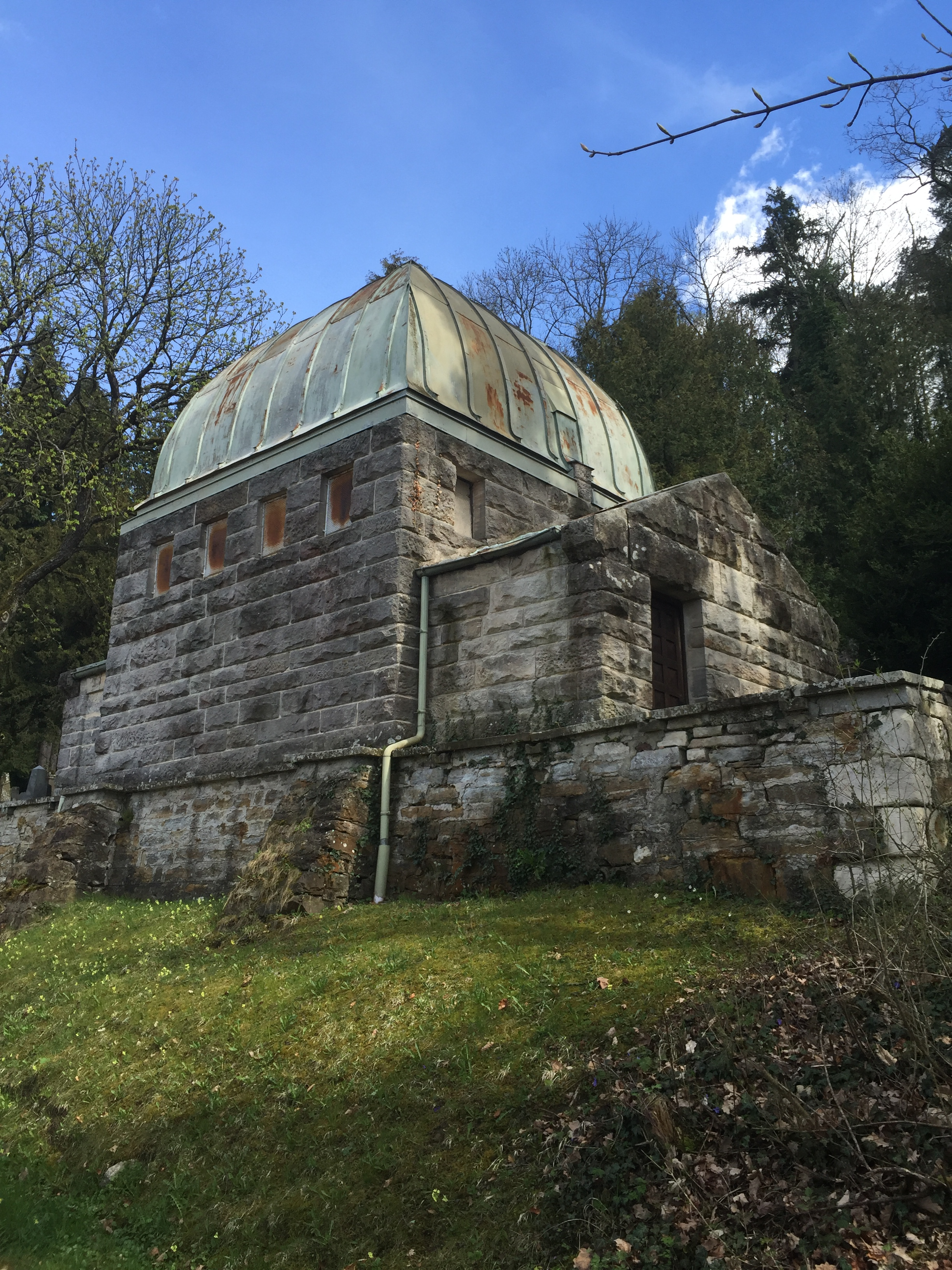 Jüdischer Friedhof in Hechingen.